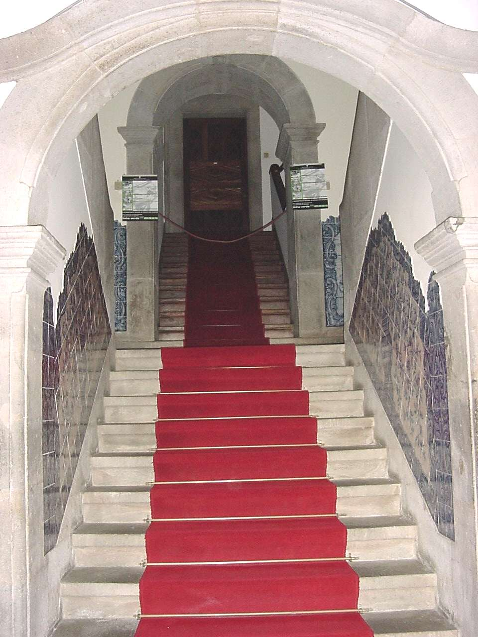 Palácio Bettencourt, Escadaria, ilha terceira, Açores, Portugal.